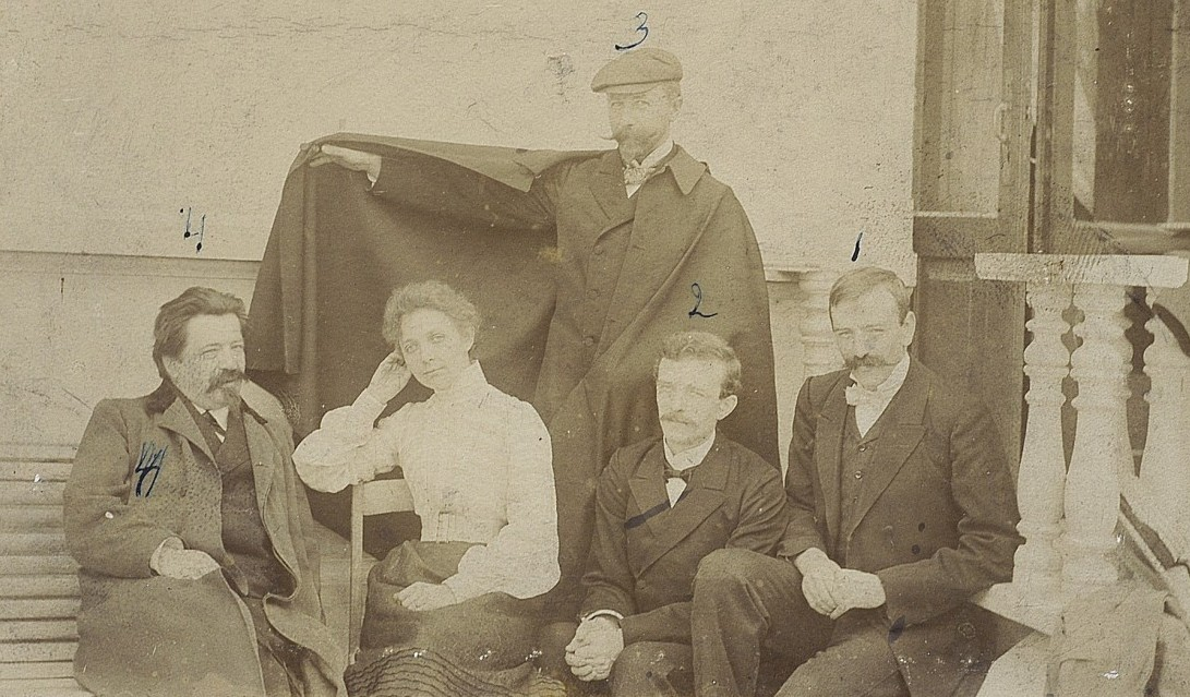 Personel lekarski Nałęczowa (1 - Dr Bronisław Malewski, 2 - Dr Meyer (ordynator) 3- Dr Stanisław Kozłowski, 4 - Dr Wacław Męczkowski, w środku Celina Blonowska)